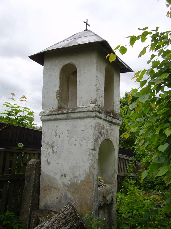 Вуглы (Барысаўскі раён, Барысаў). Каталіцкія могілкі Кальварыя. Каплічка